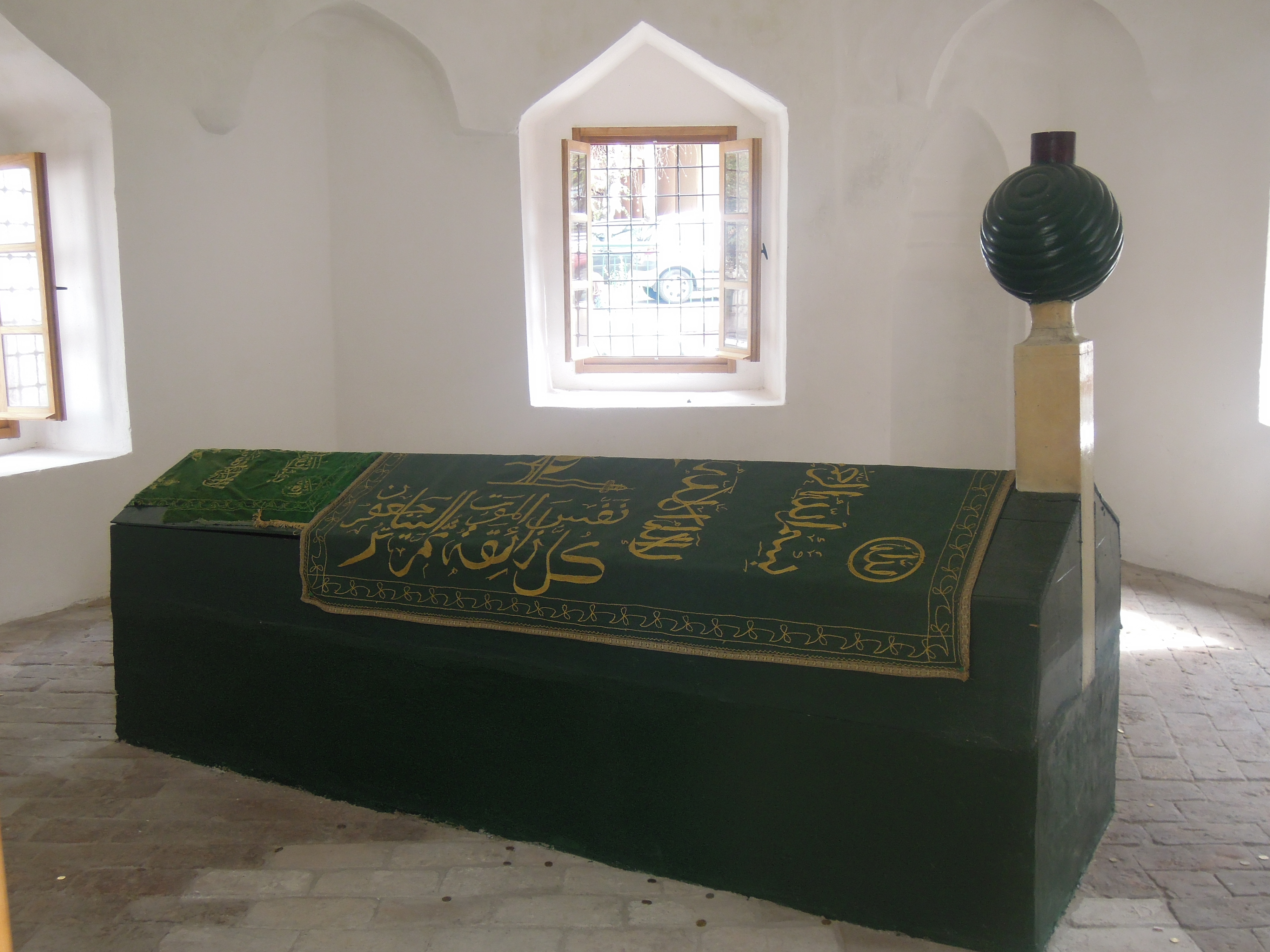 Шејх-Мустафино турбе је маузолеј у Вишњићевој улици у Београду. Подигнуто је крајем 18. века и било је у саставу текије.